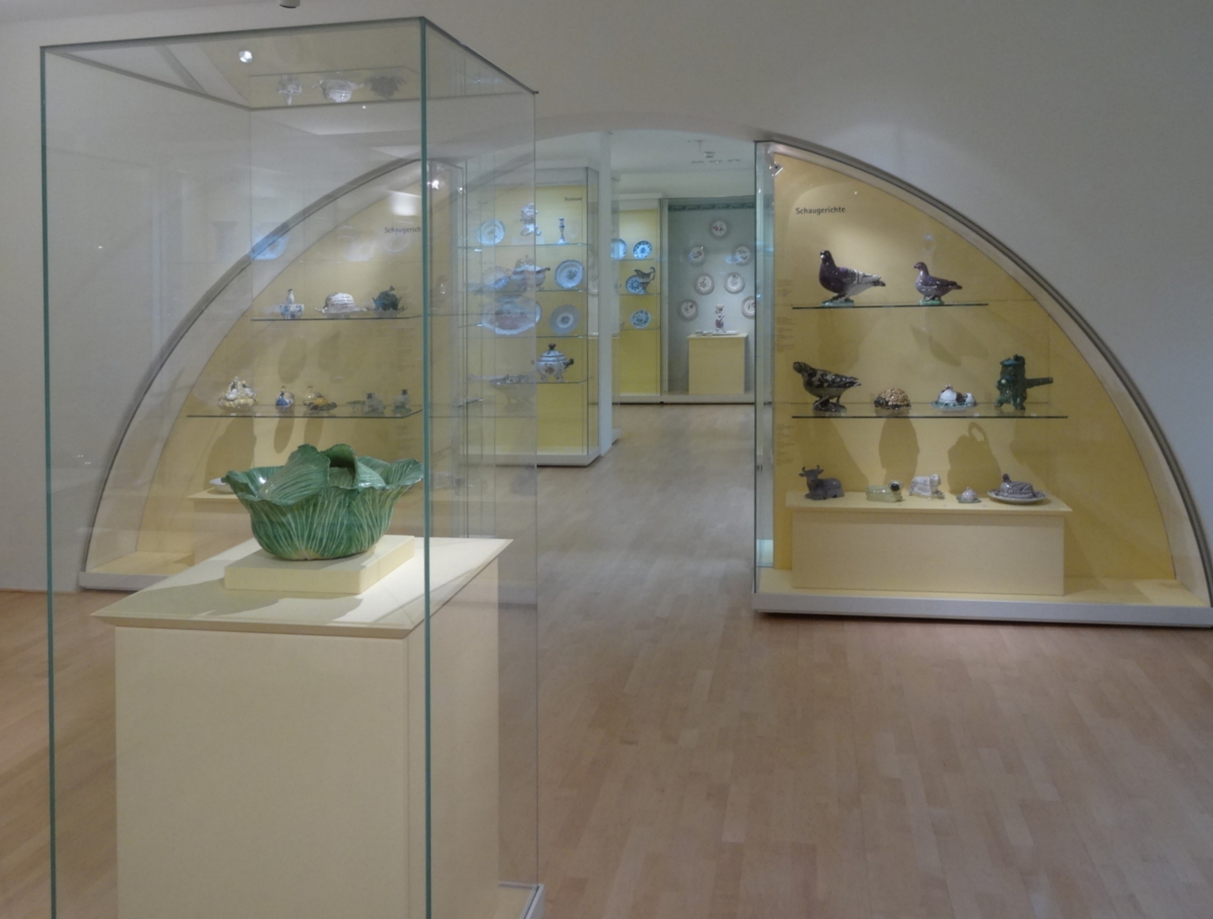 Porzellan- und Fayence-Sammlung im "Hartog-Flügel" des MKG Hamburg